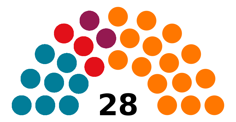 Composició del Consell General d'Andorra a la setena legislatura. Demòcrates per Andorra: 15 consellers Liberals d'Andorra: 8 consellers Coalició Junts: 3 consellers Socialdemocràcia i Progrés d'Andorra: 2 consellers Referències